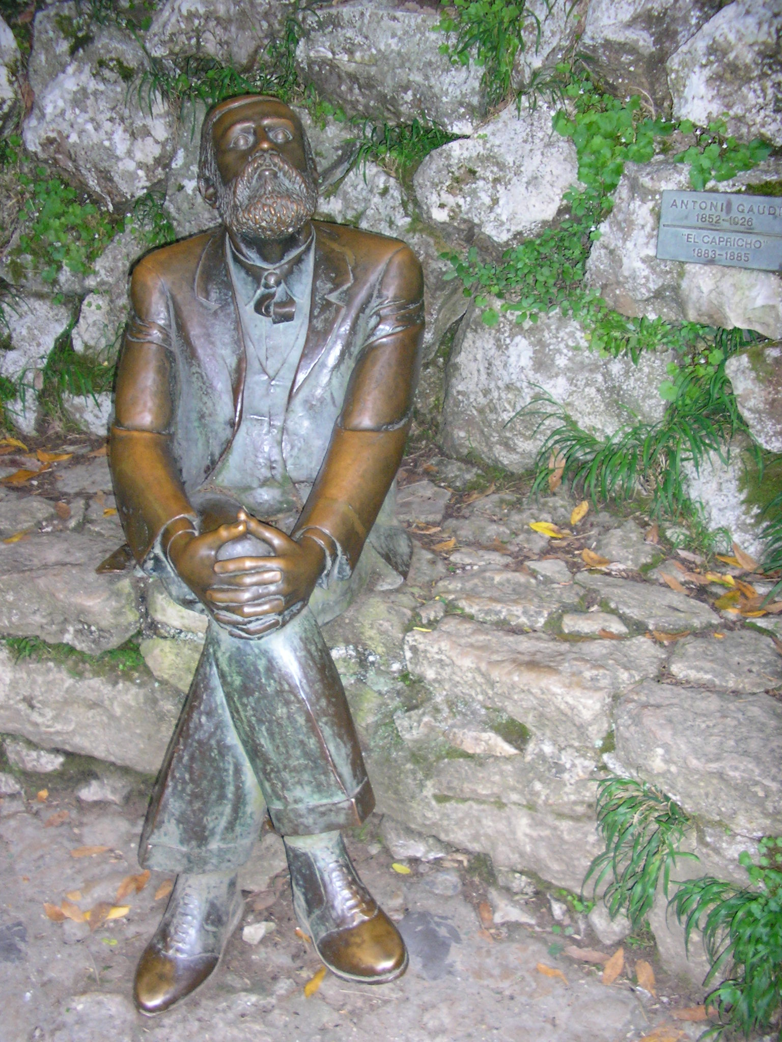 gaudì mentre guarda il suo "capriccio" a Comillas, Spagna